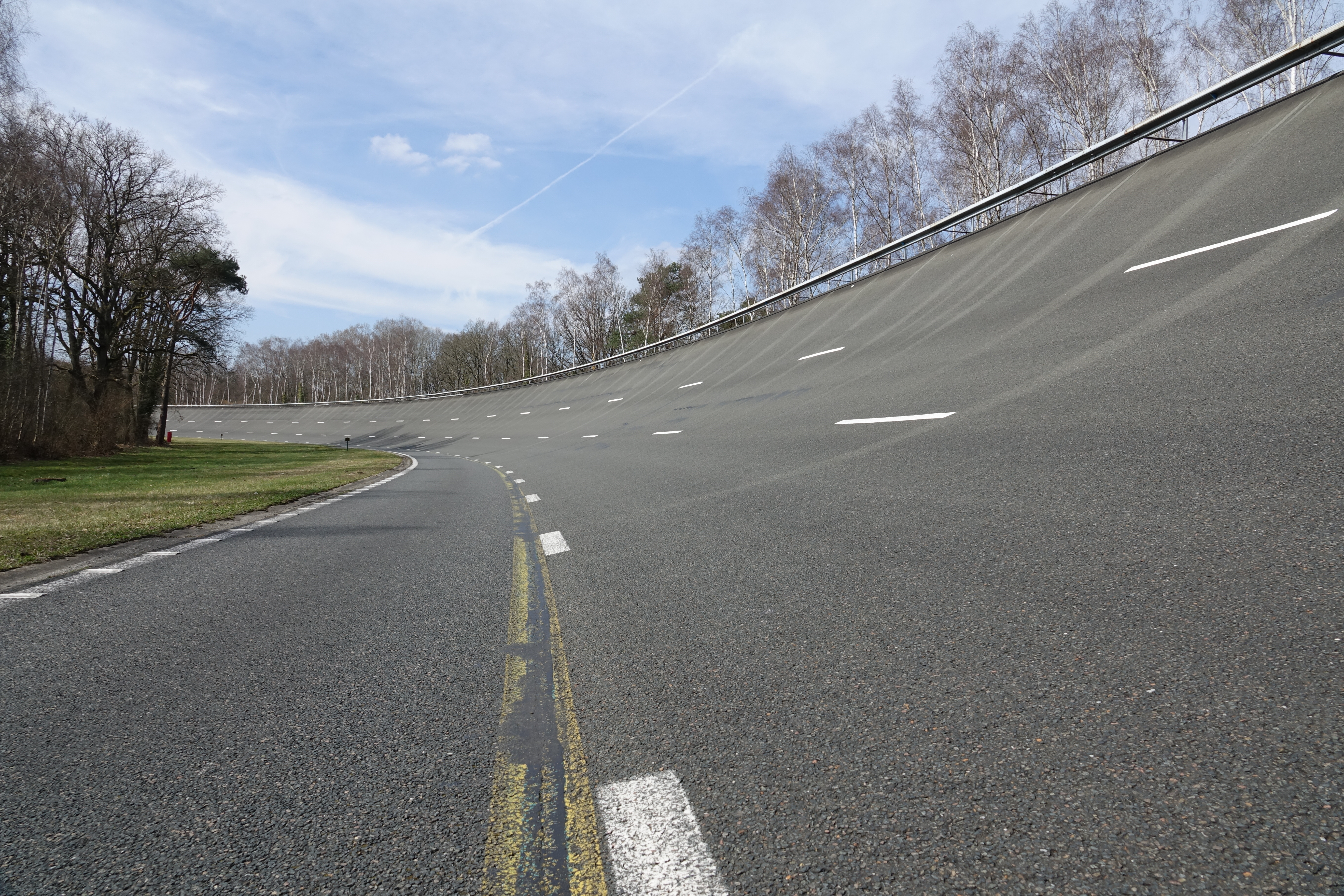 Circuit de Mortefontaine - Virage relevé